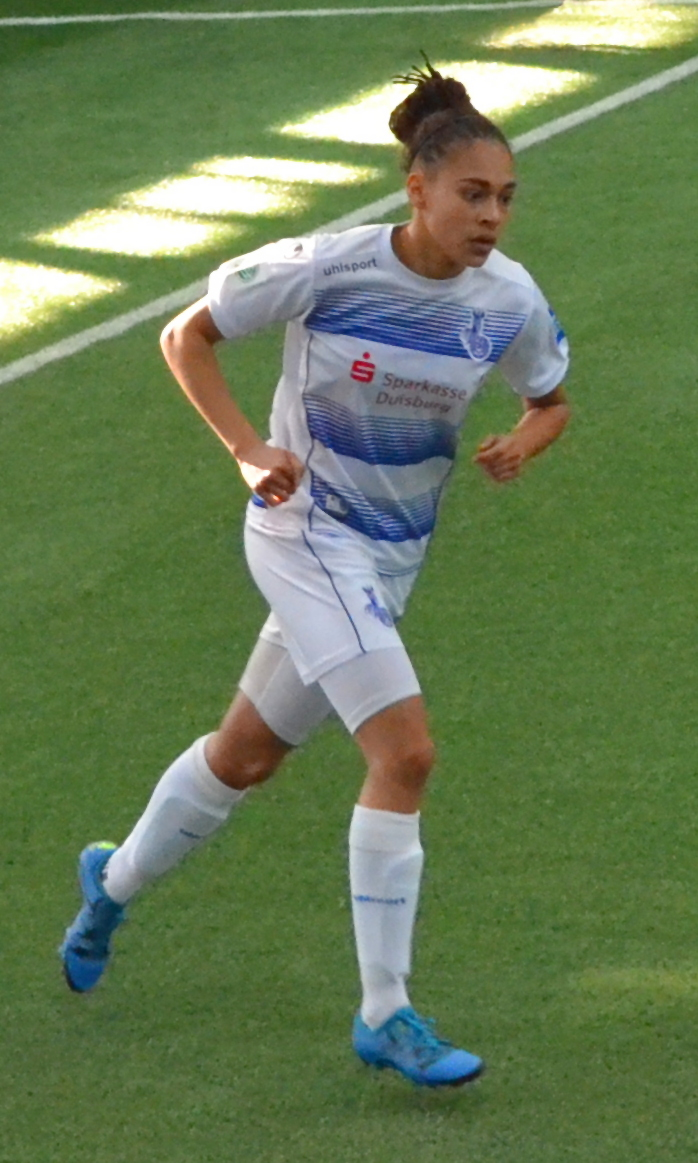 Lara Heß (MSV Duisburg) beim SAP Frauen-FußballCup 2017